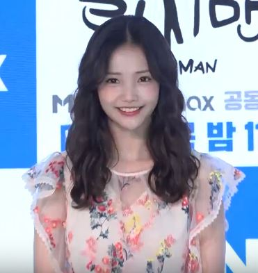 러블리 뿜뿜💕